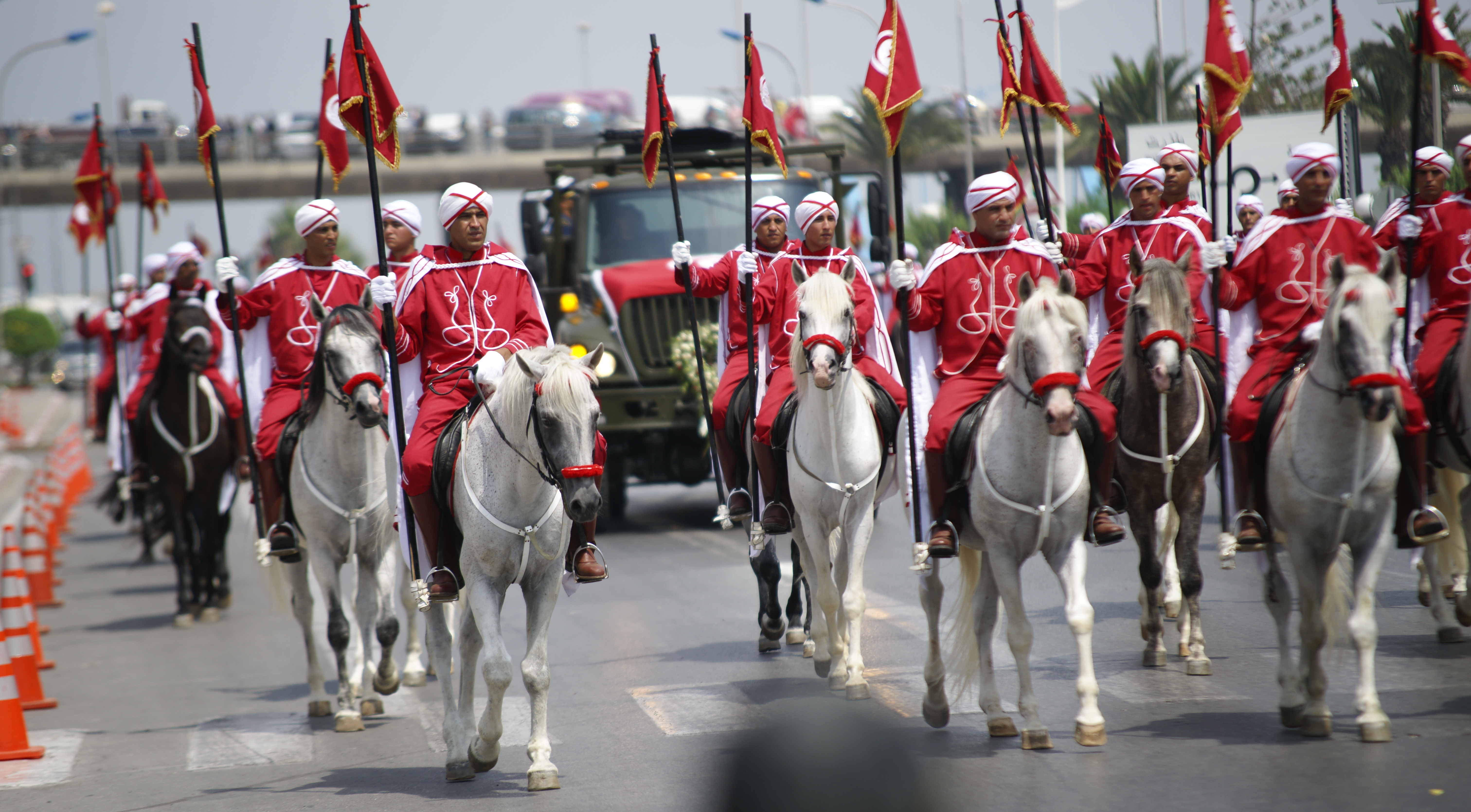 Funérailles de Beji Caid Essebsi